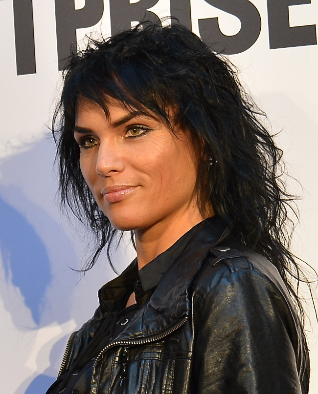 Eija Hetekivi Olsson, Augustprisnominerad 2012 med boken "Ingenbarnsland".